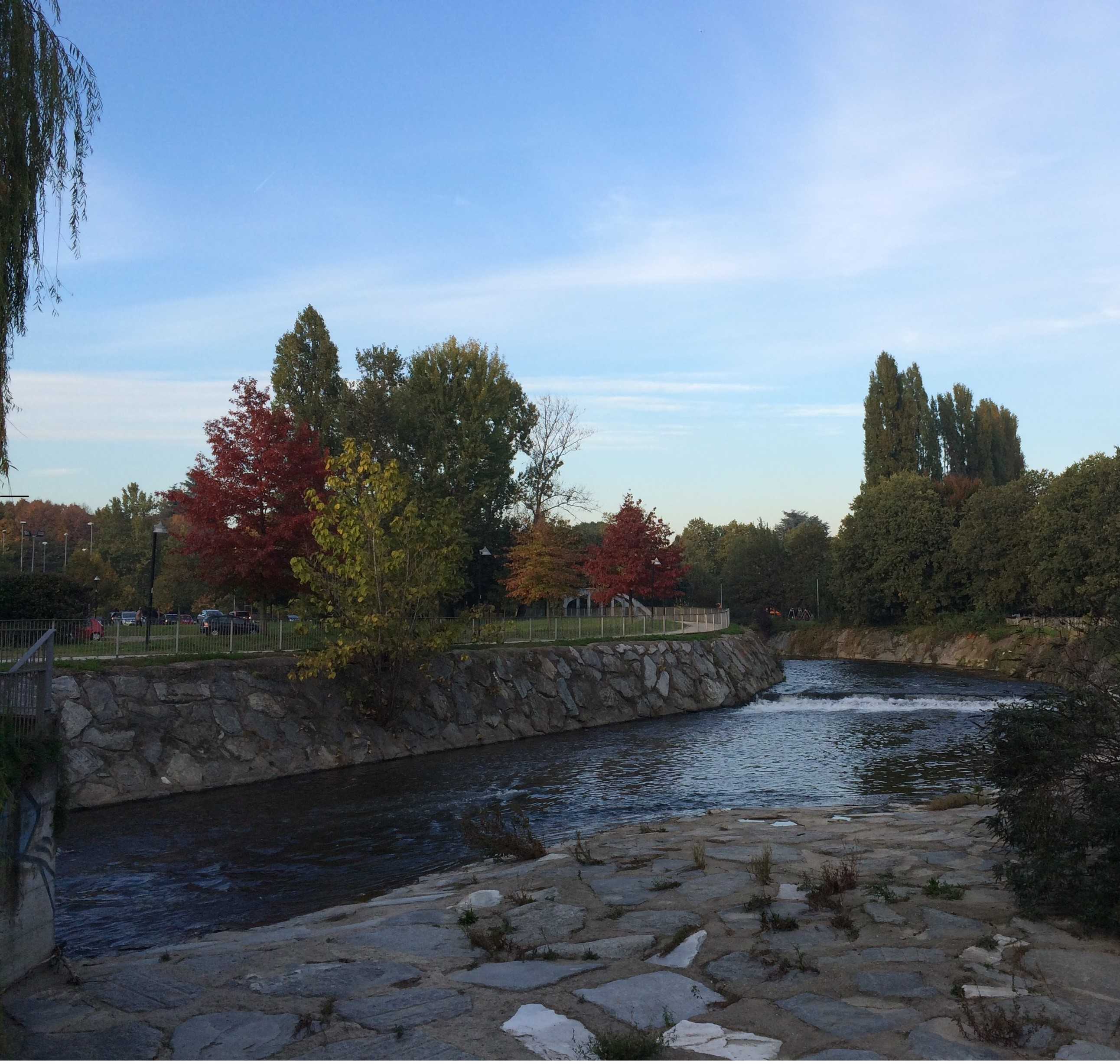 Il fiume Olona a Legnano